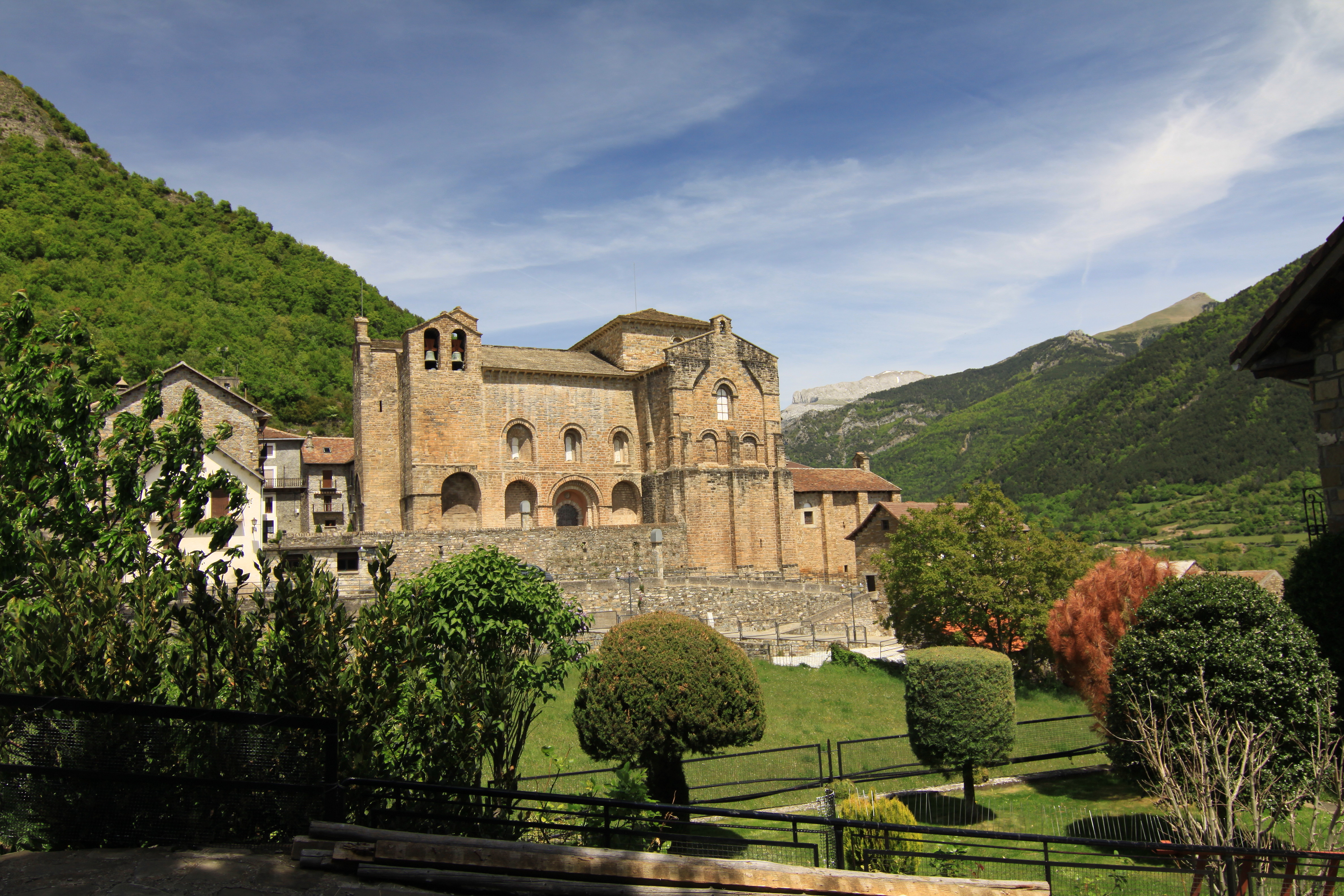 Monasterio de San Pedro de Siresa.